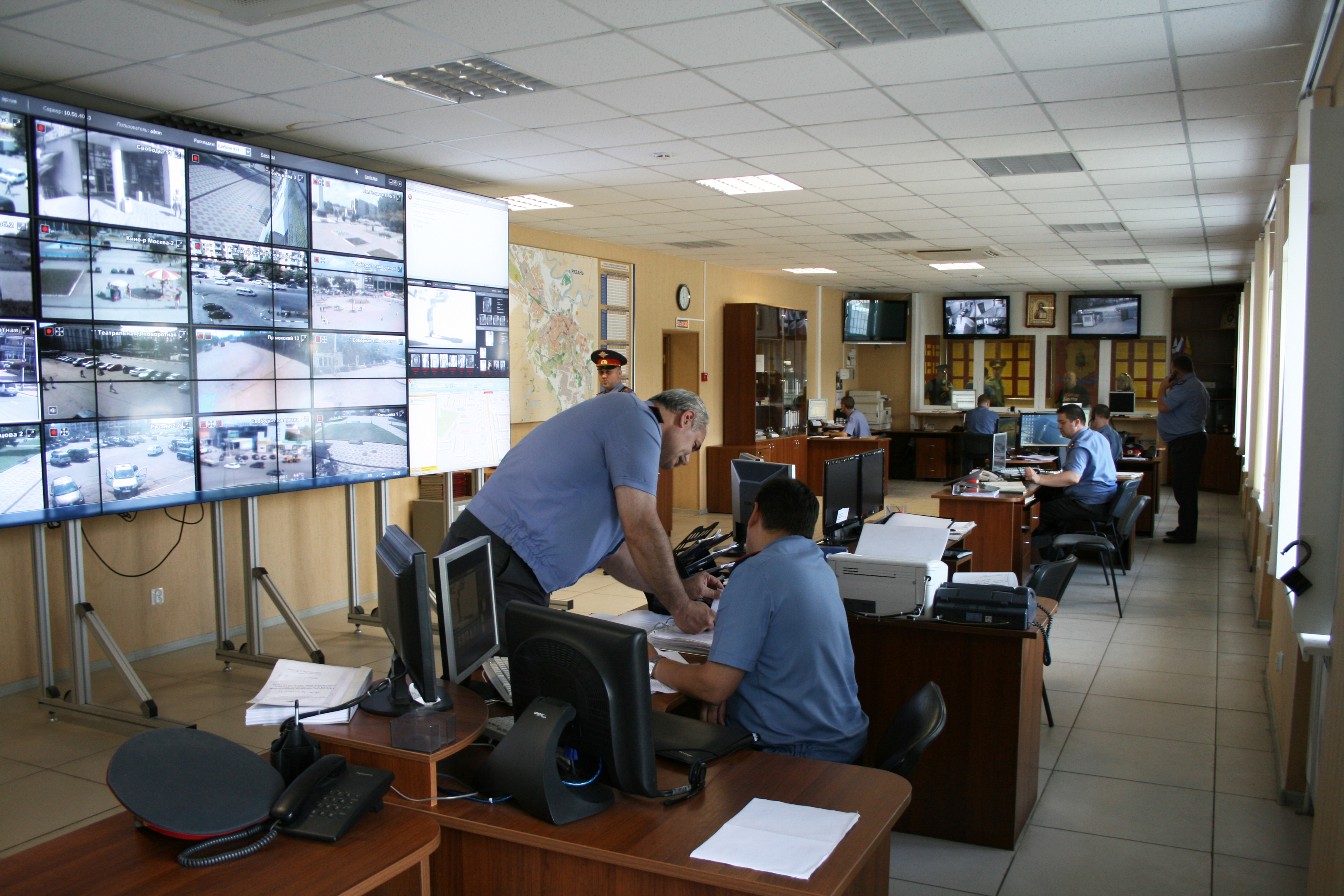 Работа дежурной части территориального органа МВД России